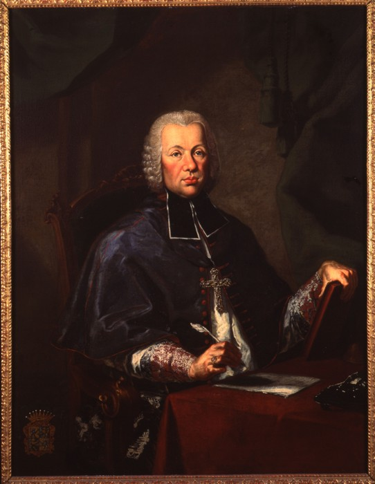 Emanuel Arnošt z Valdštejna (1716-1789), Český římskokatolický duchovní.